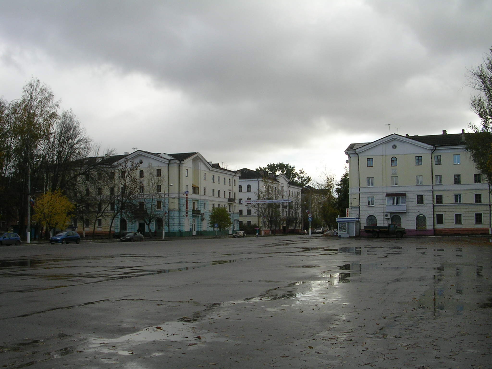 Lenin street in Safonovo